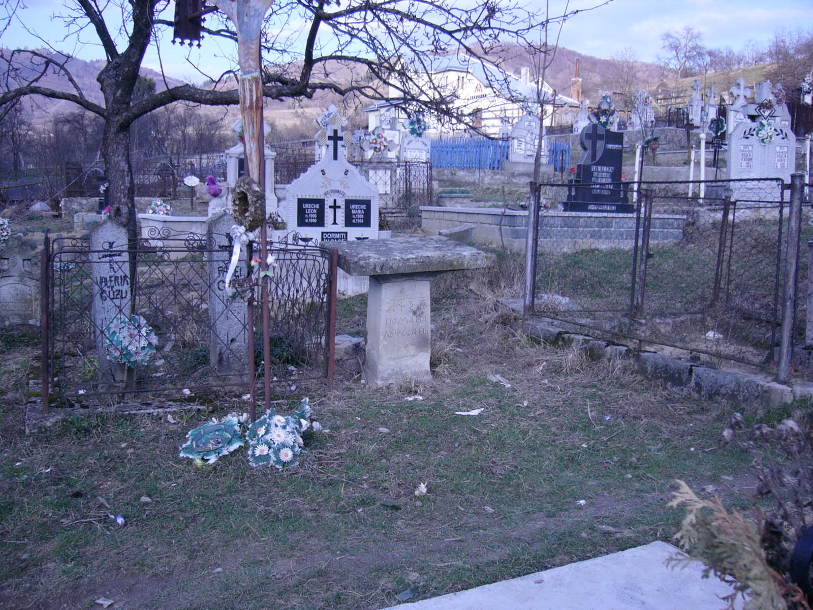 Masa altarului fostei biserici de lemn din Poiana Ilvei, judeţul Bistriţa Năsăud.